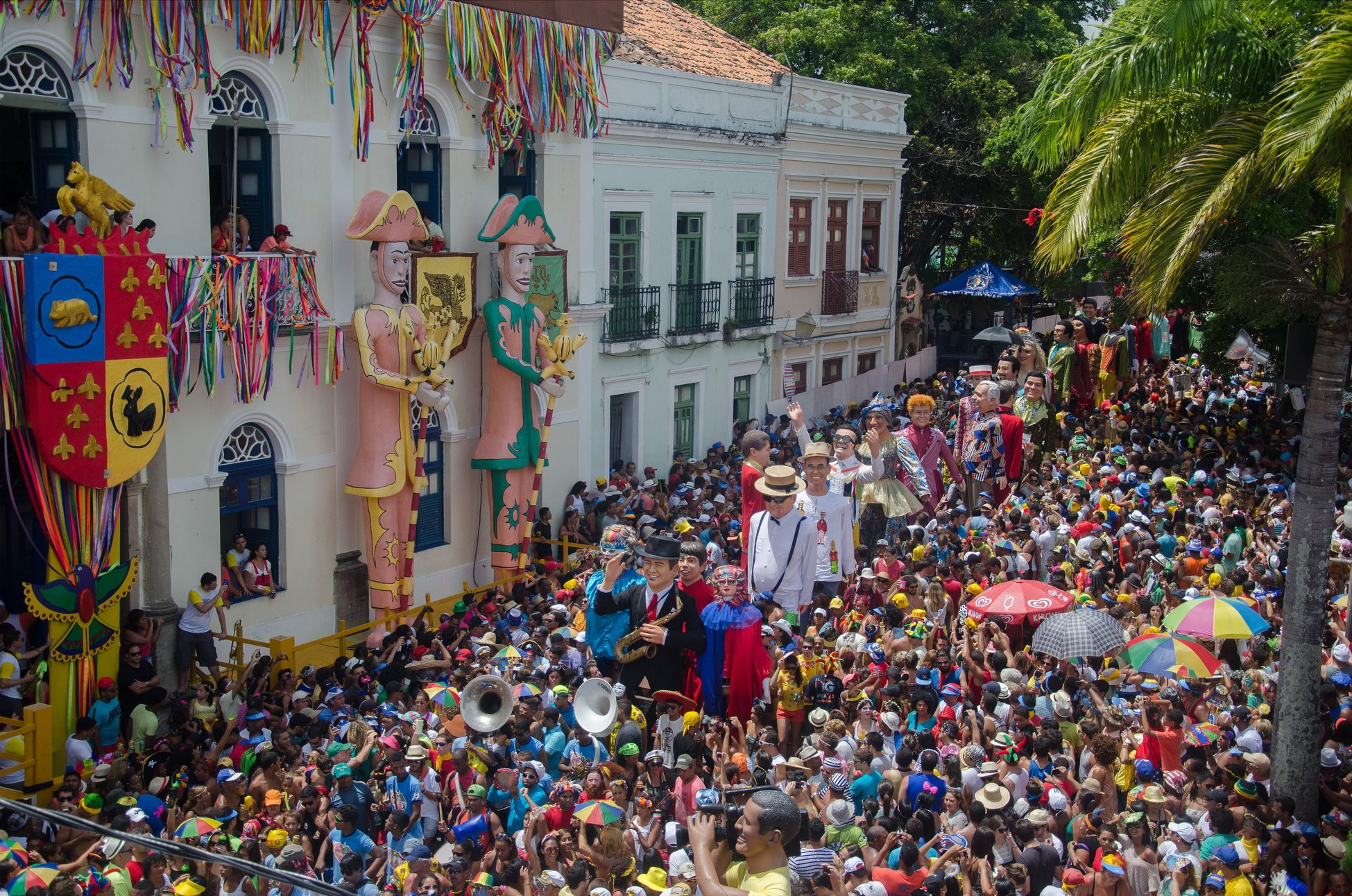 Terça-feira de Carnaval, em Olinda, é dia de conferir o Encontro de Bonecos Gigantes de Silvio Botelho. Mais de 100 bonecos participam do desfile que tem concentração no Largo do Guadalupe e segue pelas ladeiras do Sítio Histórico em direção ao Palácio dos Governadores – sede da Prefeitura de Olinda, onde acontece sua apoteose. No desfile de 2015, o homenageado foi o músico e saxifonista Maestro Spok que ganhou, inclusive, um boneco gigante idêntico a ele. Ao lado de Silvio Botelho, o pai dos bonecos gigantes de Olinda, Spok tocou ao lado de uma orquestra de frevo e puxou o arrastão de foliões que foram conferir a brincadeira Foto: Jan Ribeiro/Pref.Olinda .br/